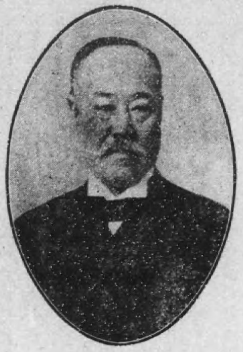 上野 理一